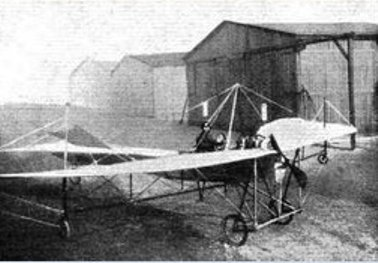 Az Igo Etrich tervezte Taube (Galamb) gép